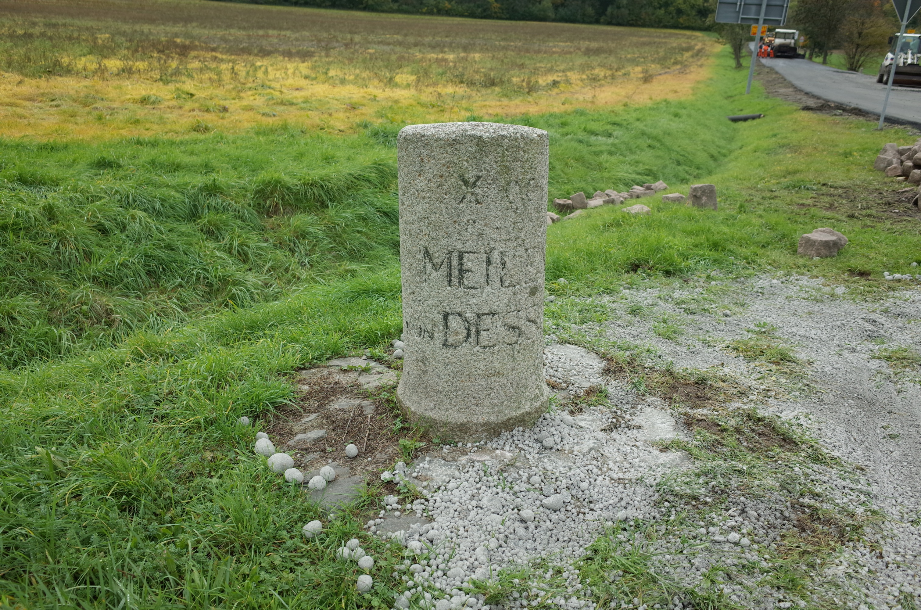 Ballenstedt, Anhaltischer Meilenstein Quedlinburger Straße am westlichen Ortsausgang an der Gabelung der Straßen Richtung Gernrode bzw. Rieder. Innschrift: X oo MEILEN VON DESSAU (Baudenkmal im Denkmalverzeichniss Sachsen-Anhalt, Erfassungsnummer: 094 50353 000 000 000 000 [1])